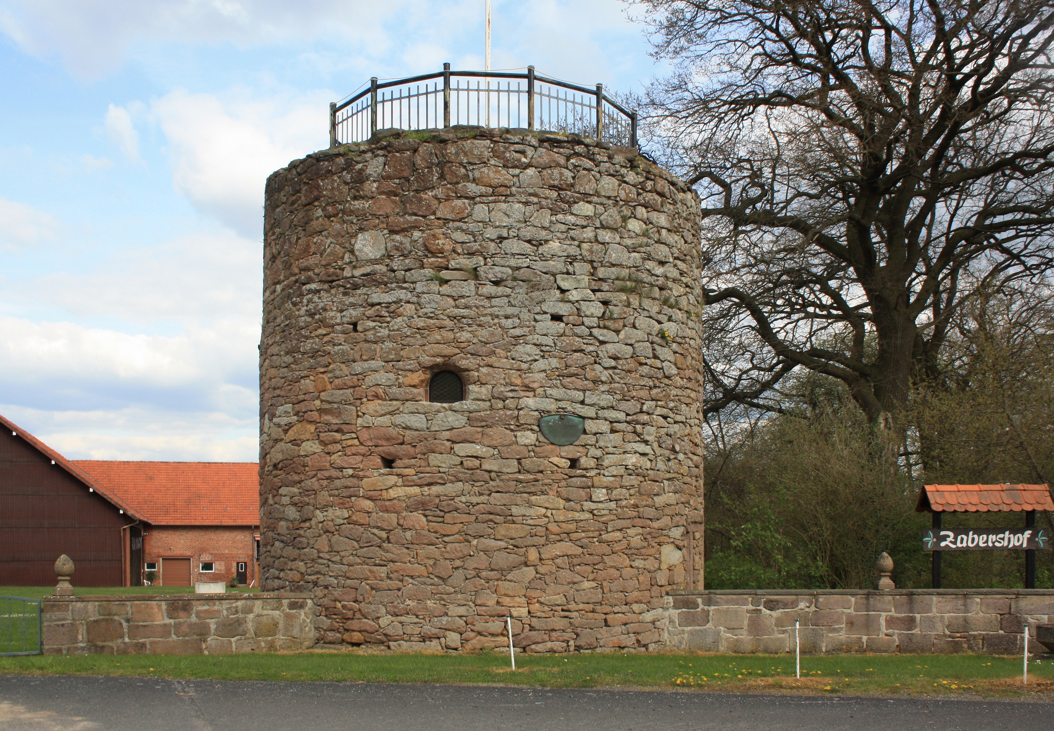 Zabershofer Warte bei Großenlüder